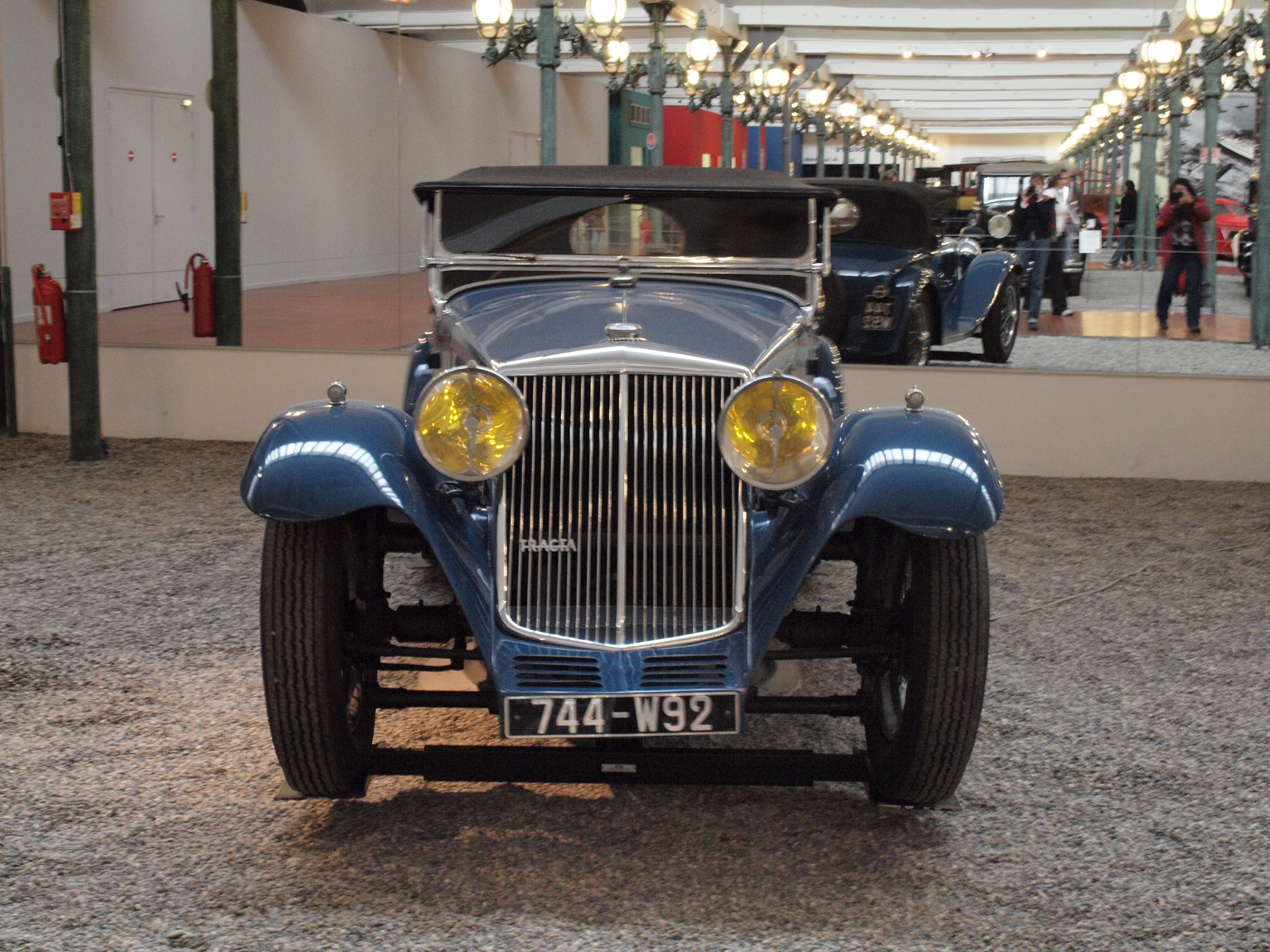 Tracta1930